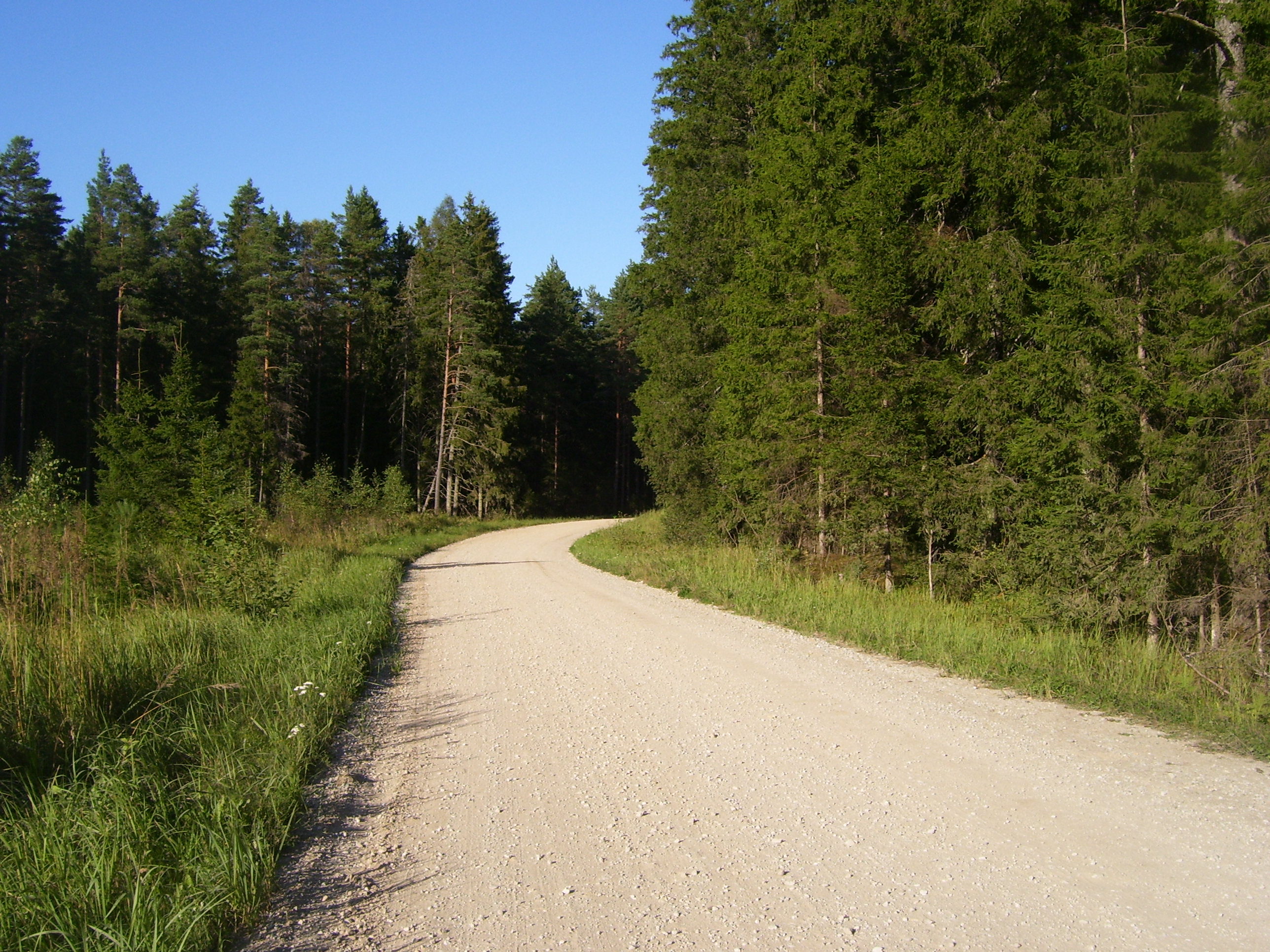 Hara tee (11271)